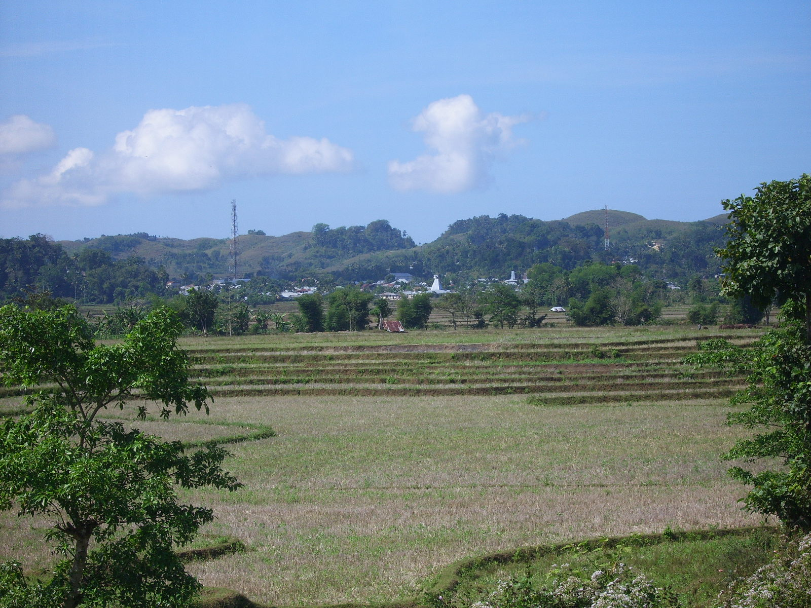 view on Waikabubak, Sumba, Indonesia